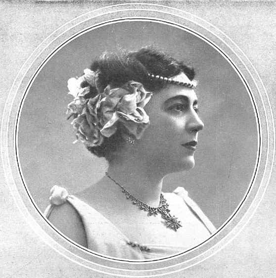 Retrato de Virginia Fábregas, obra del fotógrafo Kaulak, recogido en la revista española La Esfera.